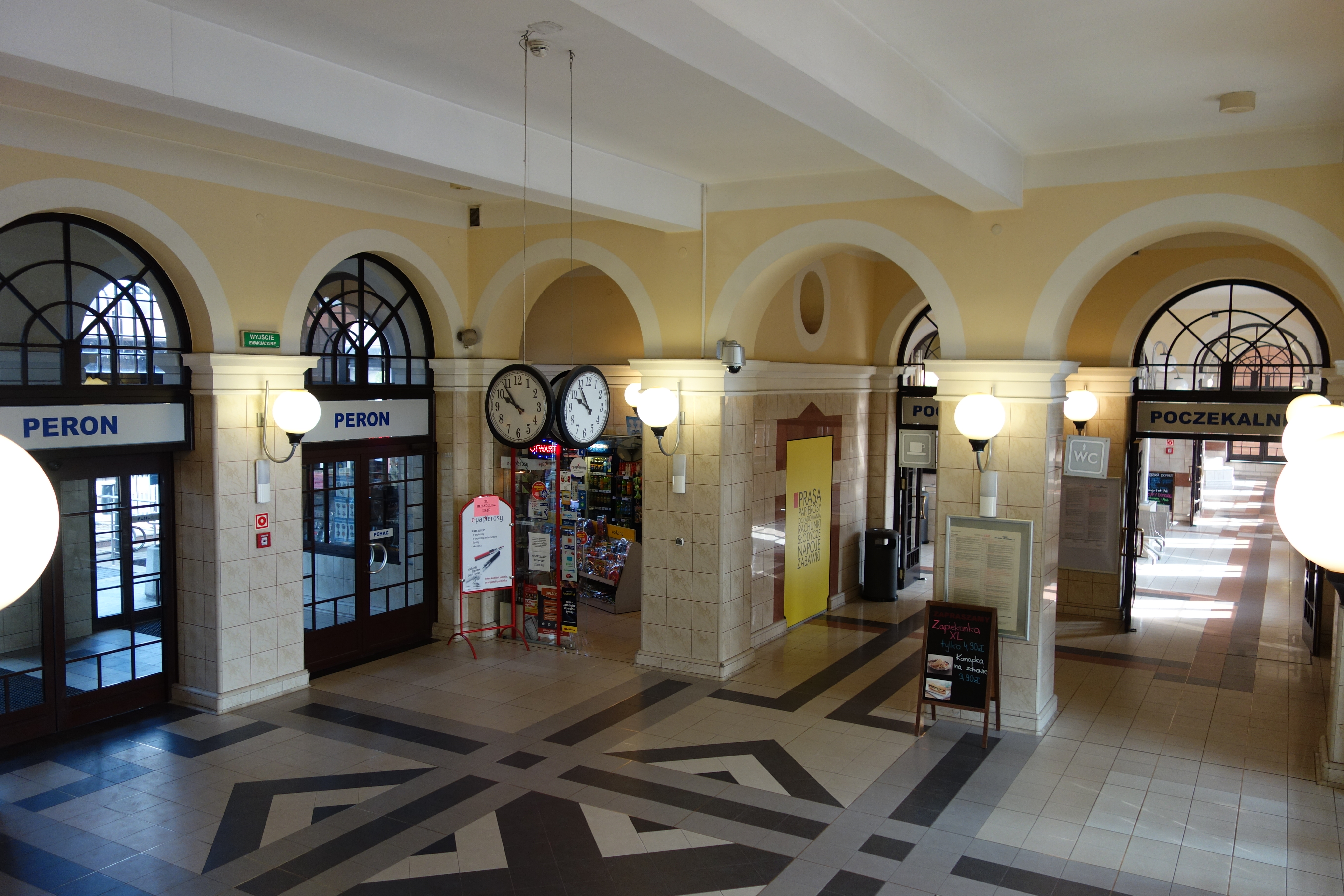 Skierniewice - dworzec kolejowy , You can see all photographs in category Wikiekspedycja kolejowa 2014.